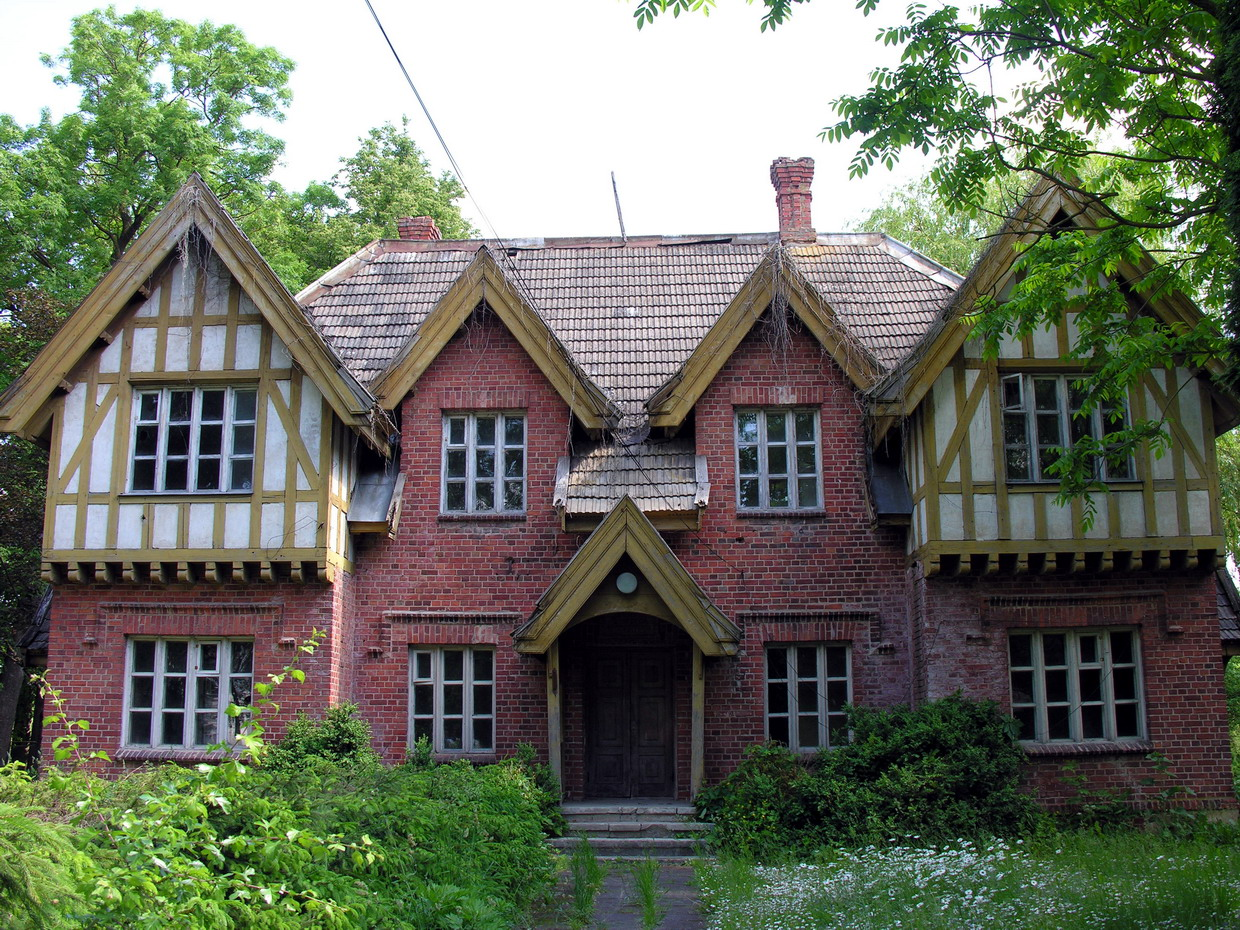 Žagarės regioninis parkas: Žagarės žirgyno buv. administracijos pastatas